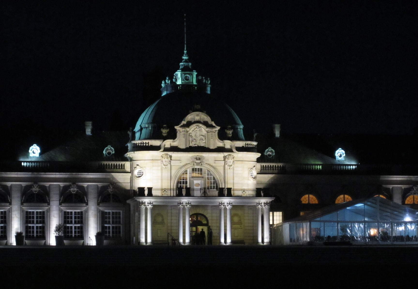 Bad Oeynhausen Kaiserpalais